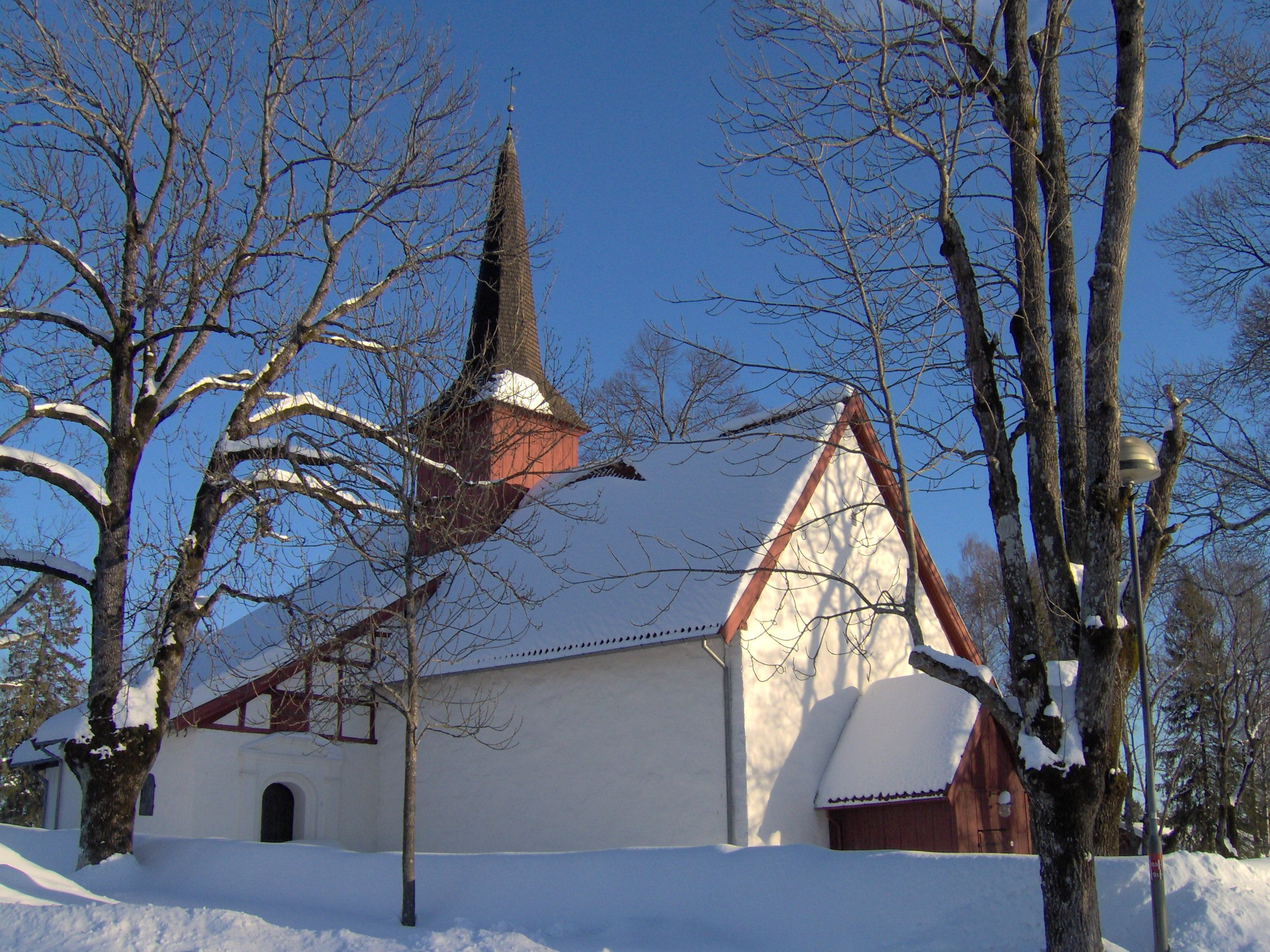 Tanum church in Bærum, Norway